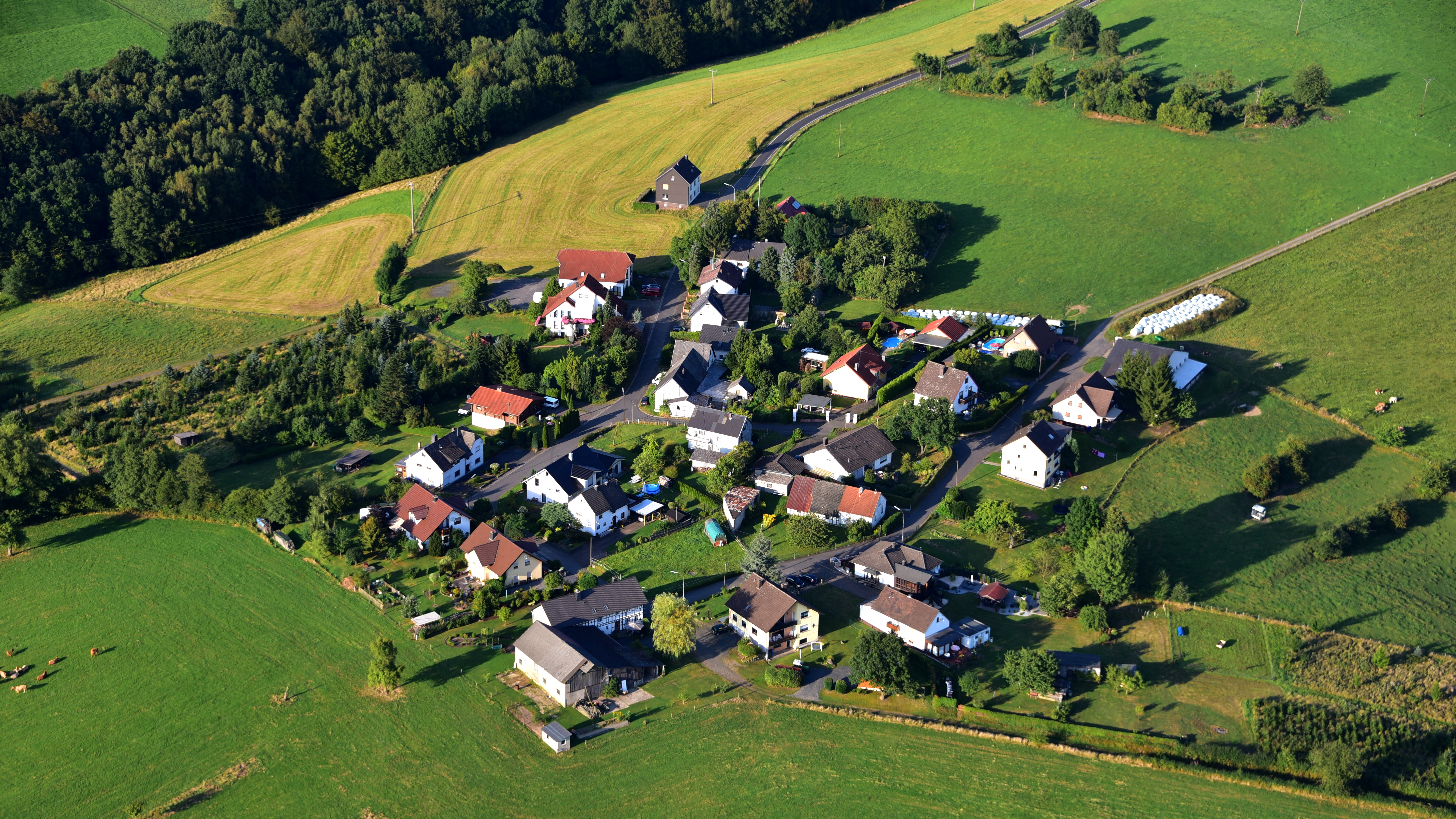 Thelenberg, Luftaufnahme (2016)